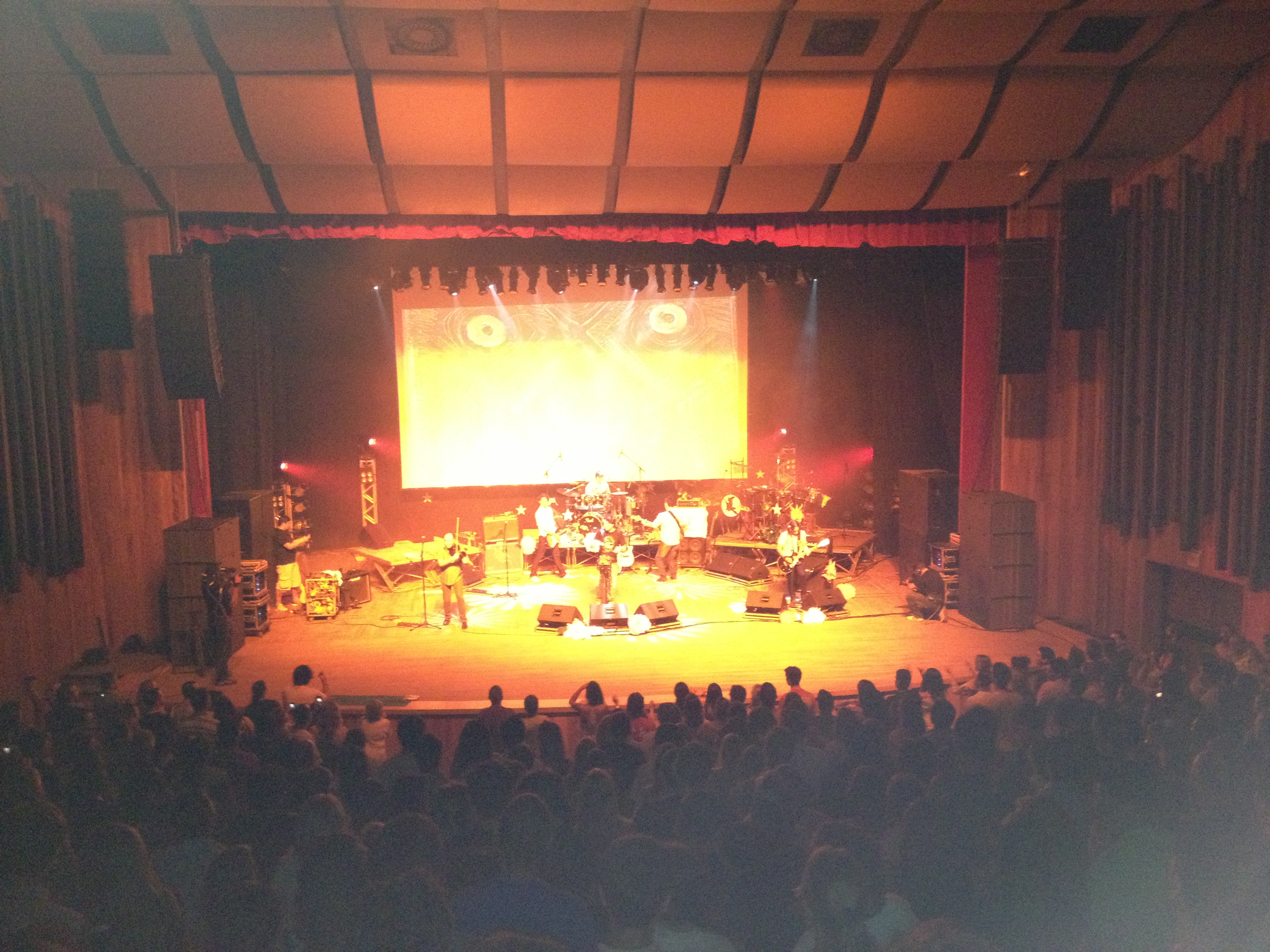 Show do Dazaranha no Teatro Ademir Rosa, Centro Integrado de Cultura, Florianópolis, SC.